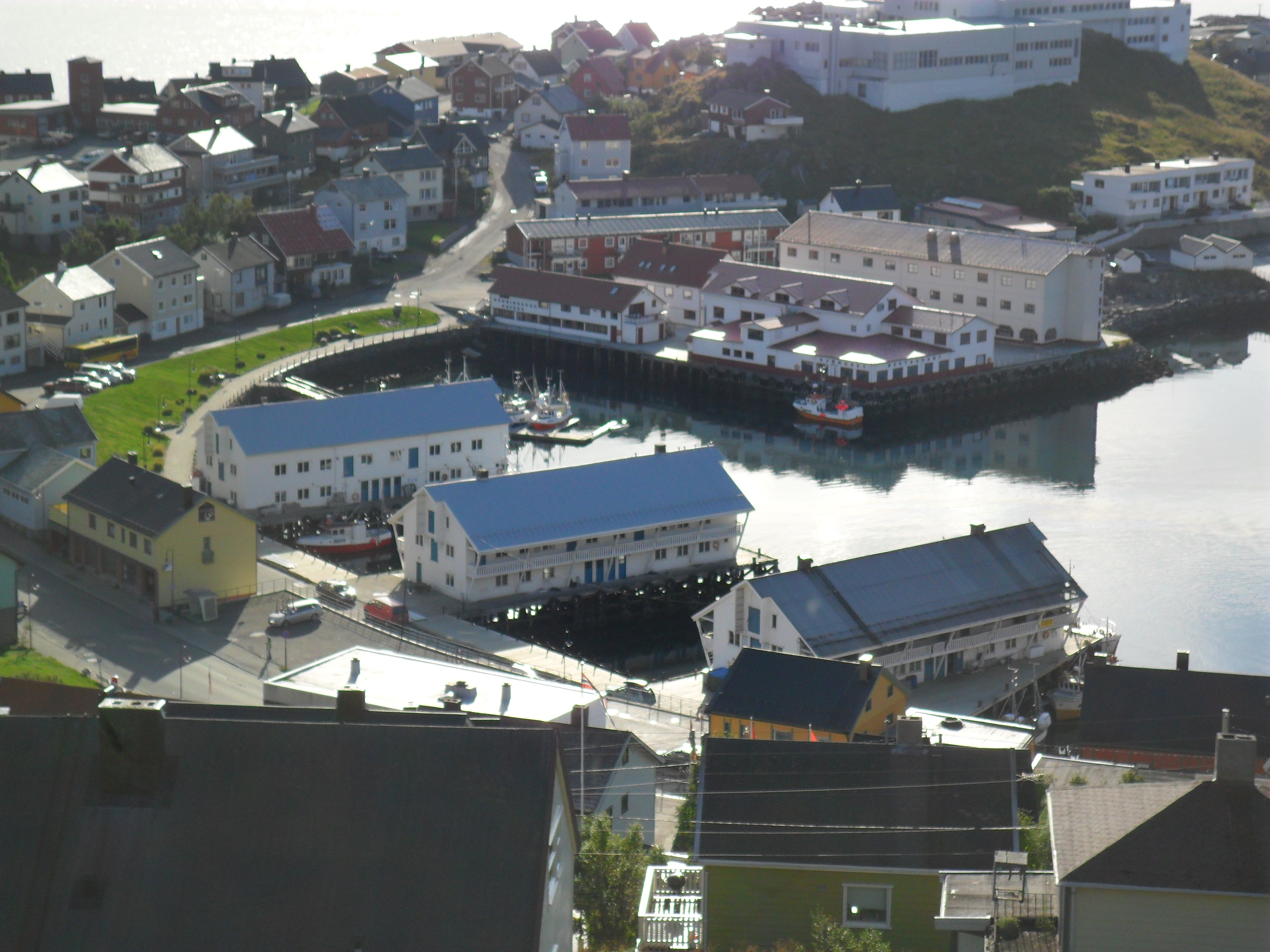 Sjøhus i Honningsvåg, Nordkapp kommune, bygget i årene 1953-1961